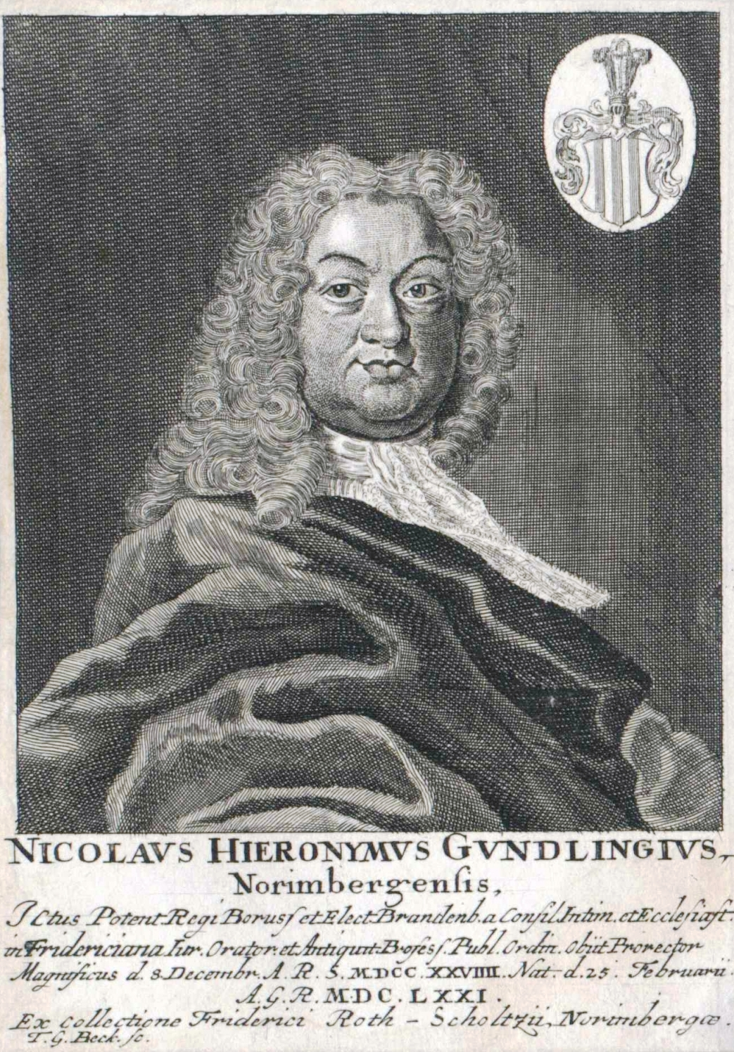 Nicolaus Hieronymus Gundlingius (1671–1729)